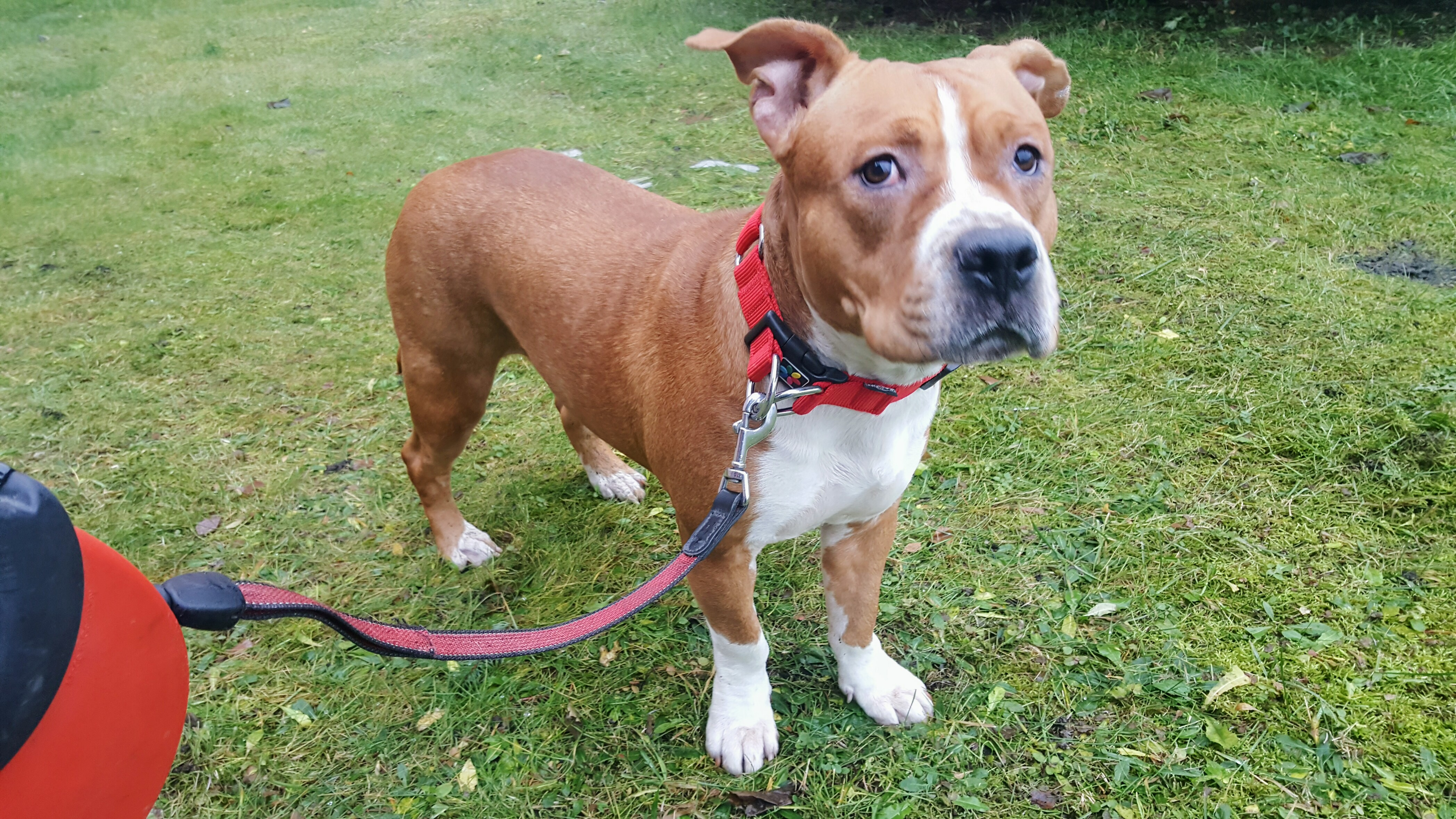 Koera isekeriv jalutusrihm